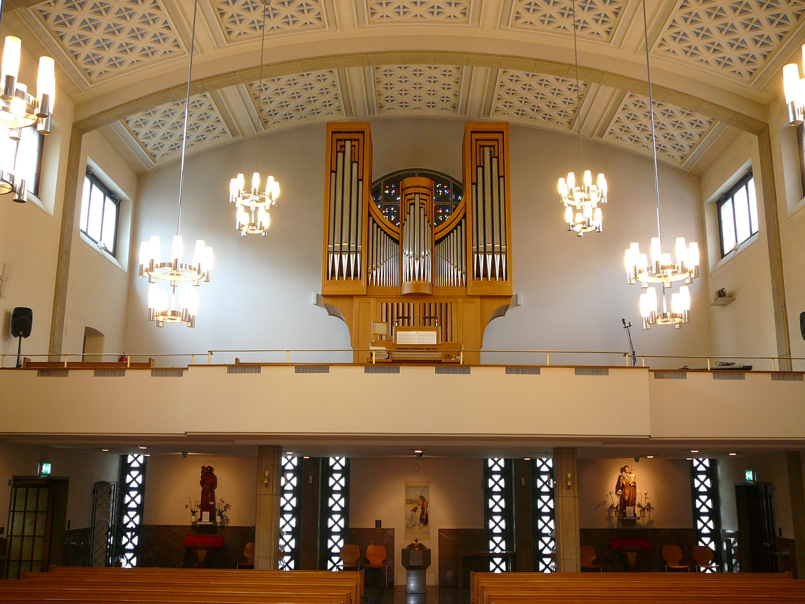 Römisch-katholische Kirche Don Bosco Zürich-Aussersihl, Orgelempore